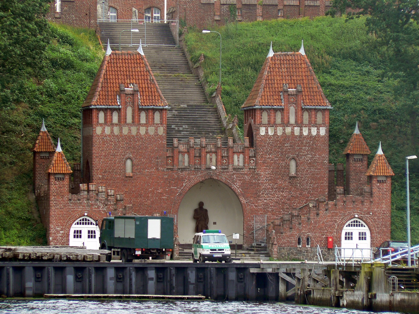 Marineschule Mürwik: Zugang zur Flensburger Förde. Im Eingang des Wassertores steht des weiteren die hölzerne Statue des Prinzen Adalbert von Preußen.